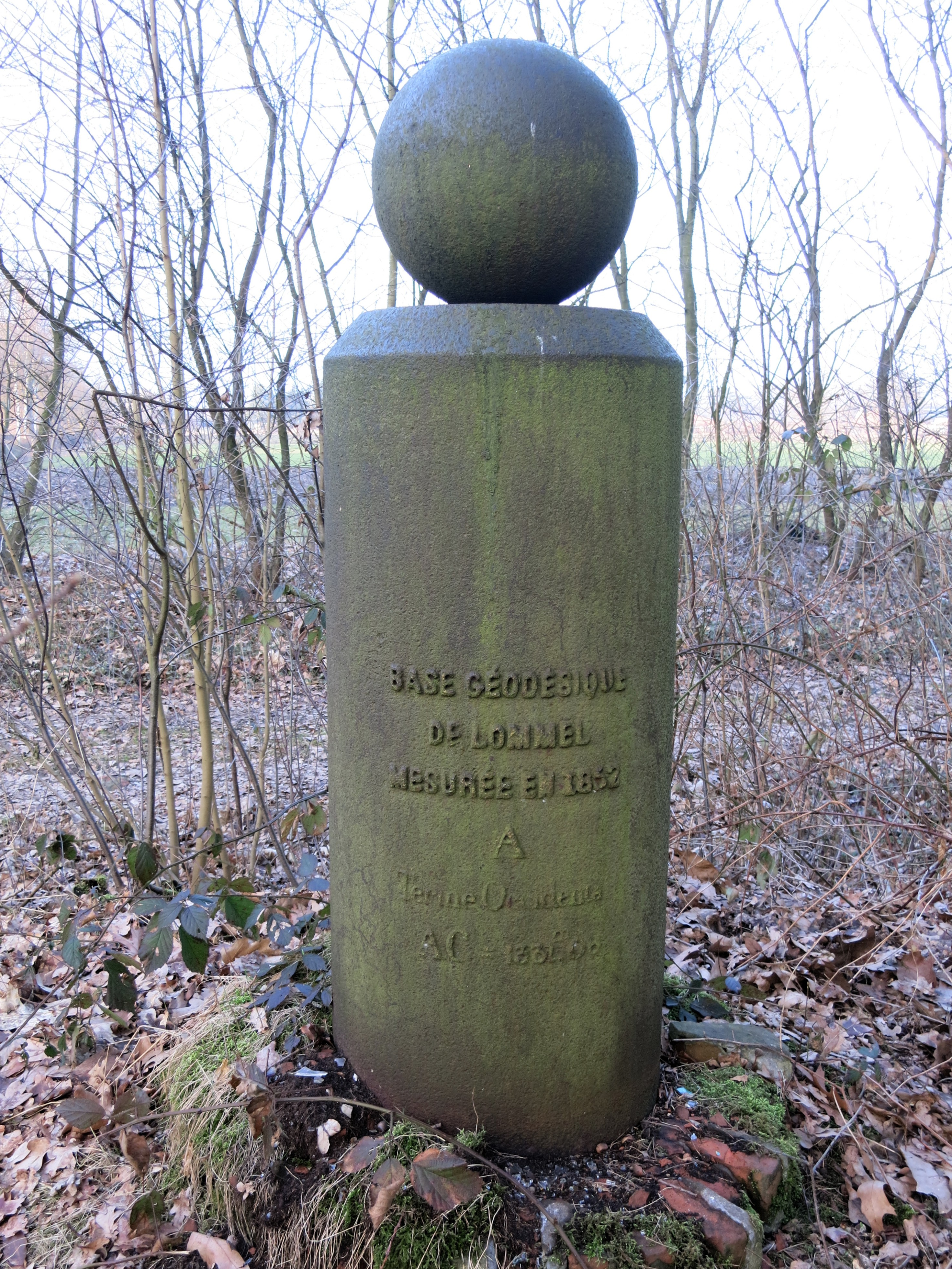 Historisch geodetisch punt: meest westelijke, enige overblijvende van drie ijzeren palen van de Geodetische Basis van Lommel, gemeten in 1851 en 1852. Op het einde van de Heidestraat in Hechtel-Eksel, aan de rand van het militaire schietveld. Zie Wikipedia Geodetische Basis van Lommel